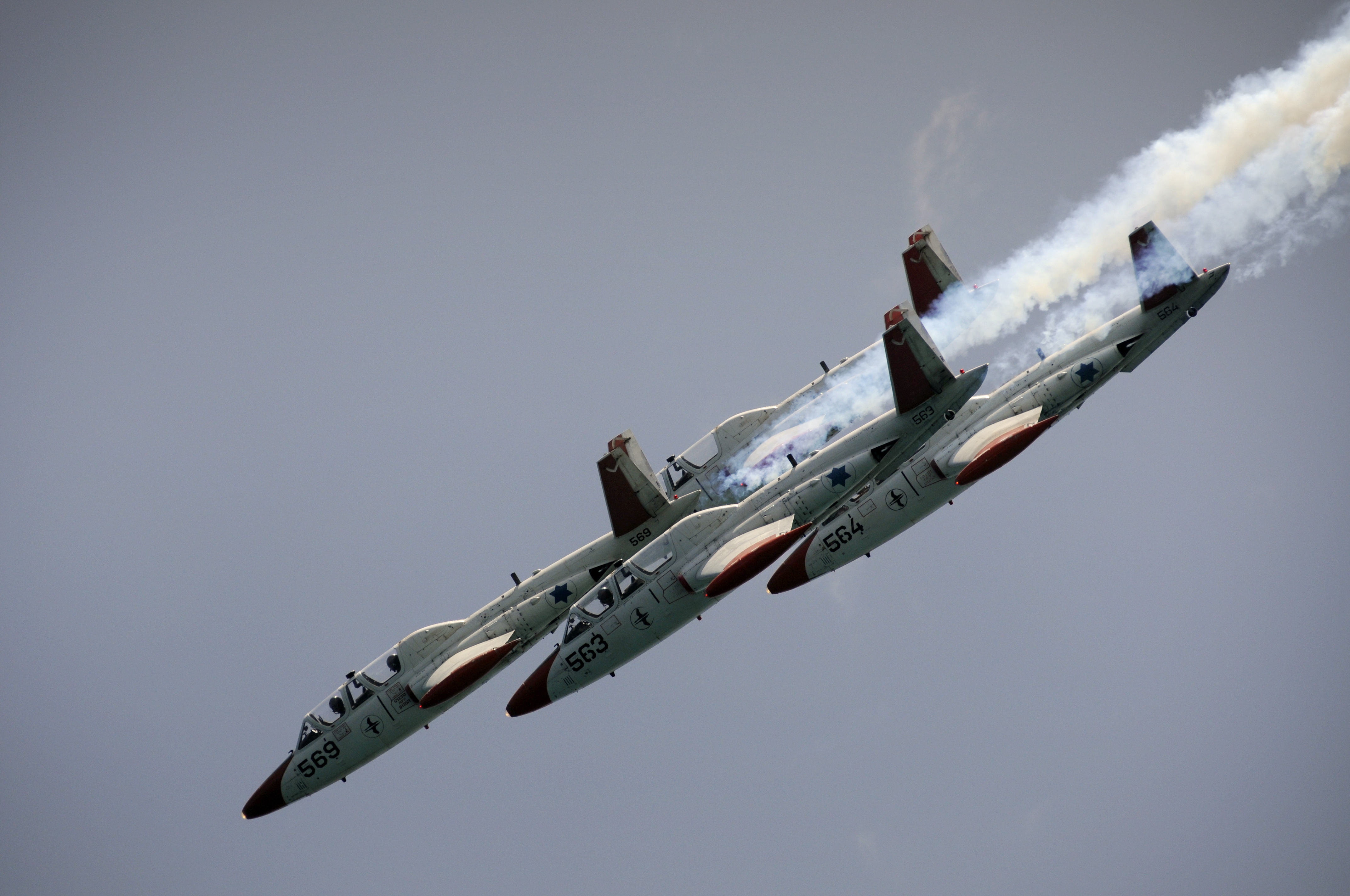 April 29, 2009. The IDF takes part in the celebrations of Israel's 61st Independence Day. Featured as "Photo of the Day" on November 17, 2010. Photo by Michael Shvadron, IDF Spokesperon's Film Unit. לרגל יום העצמאות ה-61 למדינת ישראל, התקיימו לאורך חופי הארץ ומעל הערים המרכזיות משט של ספינות חיל הים ומטס של כלי התעופה של חיל האוויר. התמונה פורסמה כ"תמונת היום" בתאריך נובמבר 17, 2010. צולם על ידי מיכאל שבדרון, יחידת ההסרטה, דובר צה"ל.